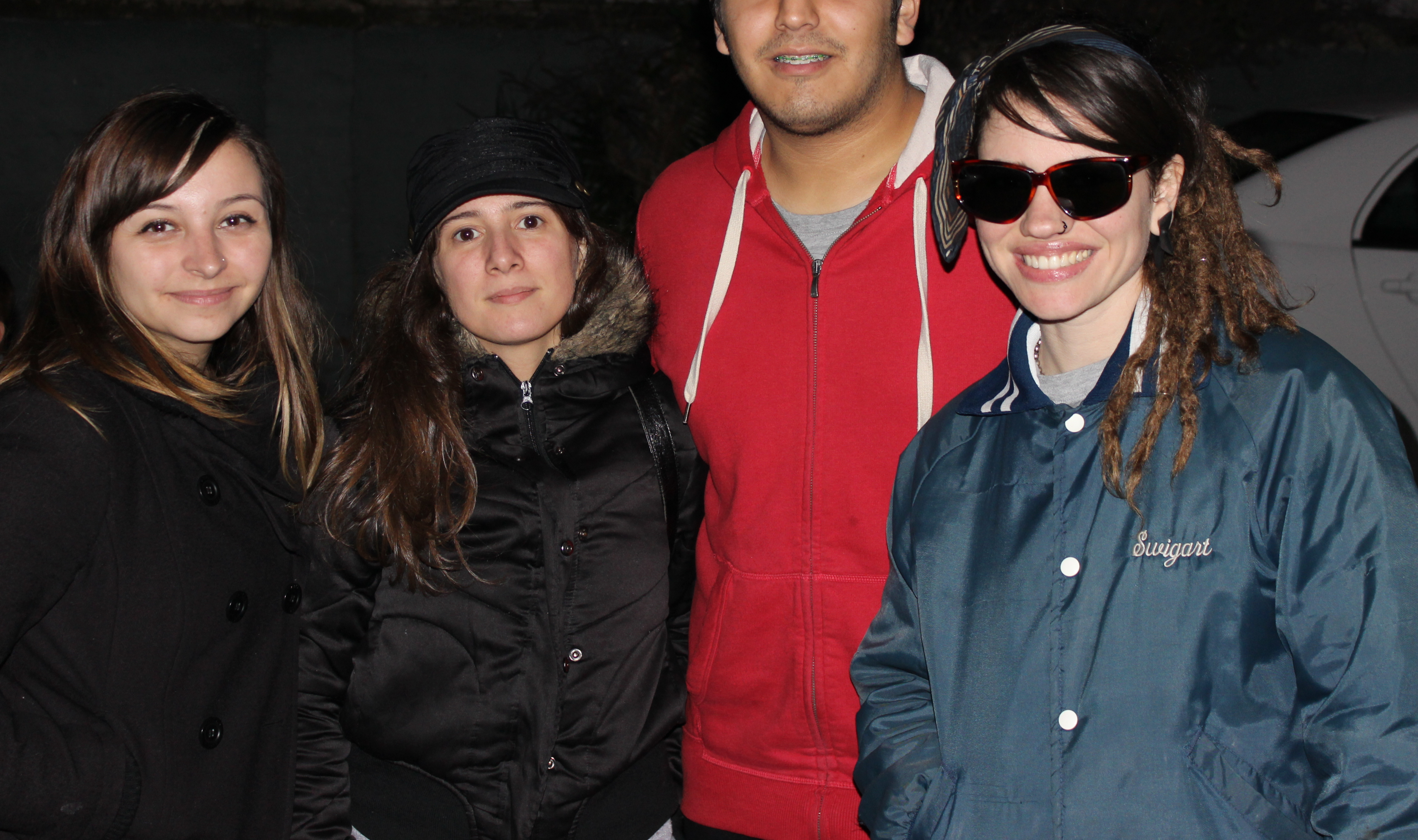 Supernova en la Radio Universidad de Chile.